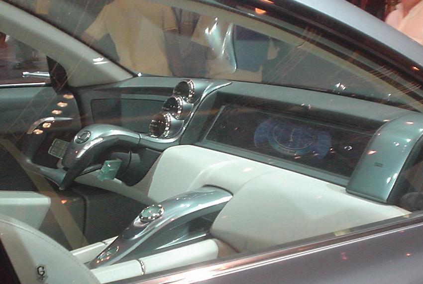 LF-X